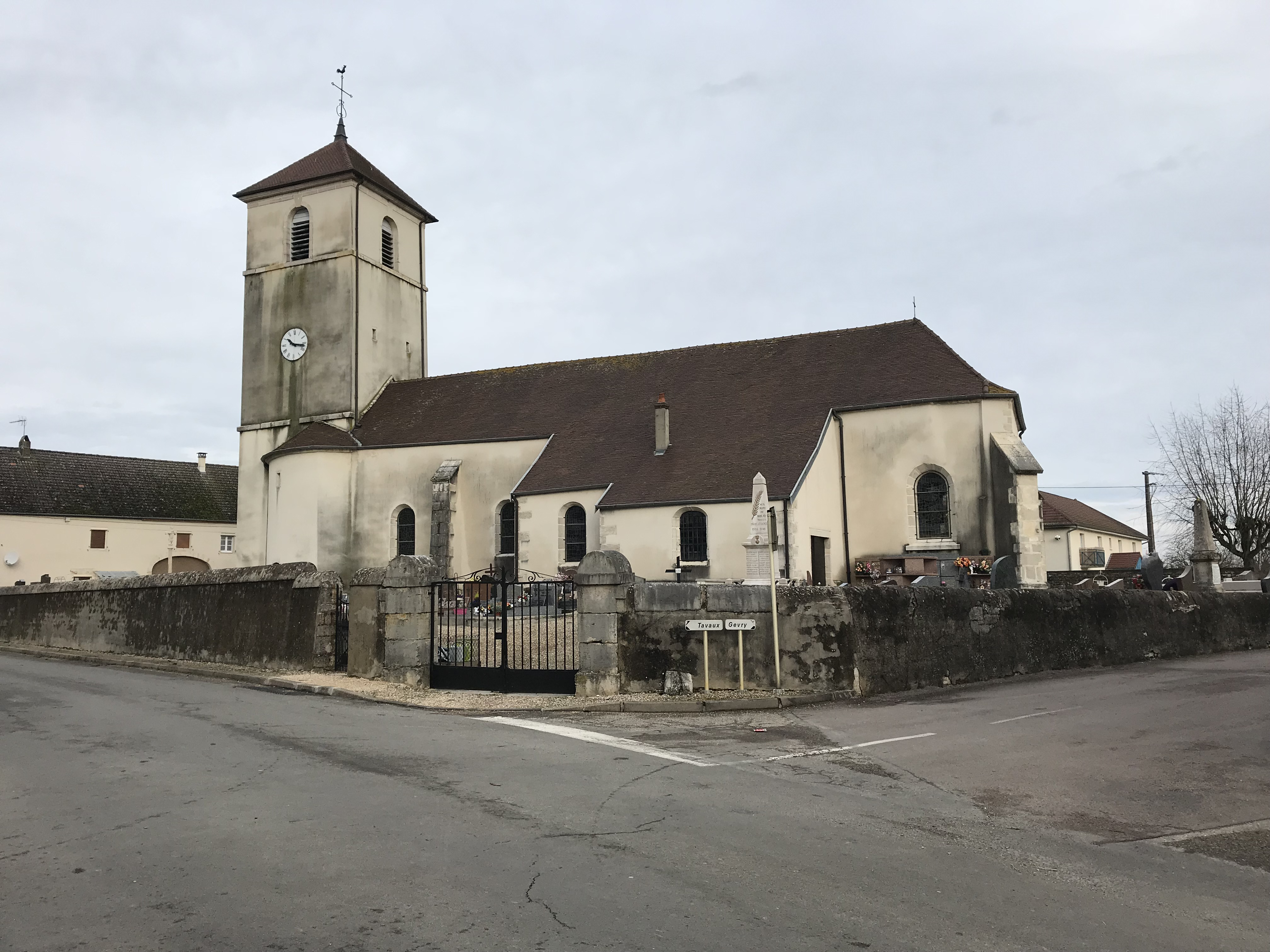 Image de Molay (Jura, France) le 7 janvier 2018.